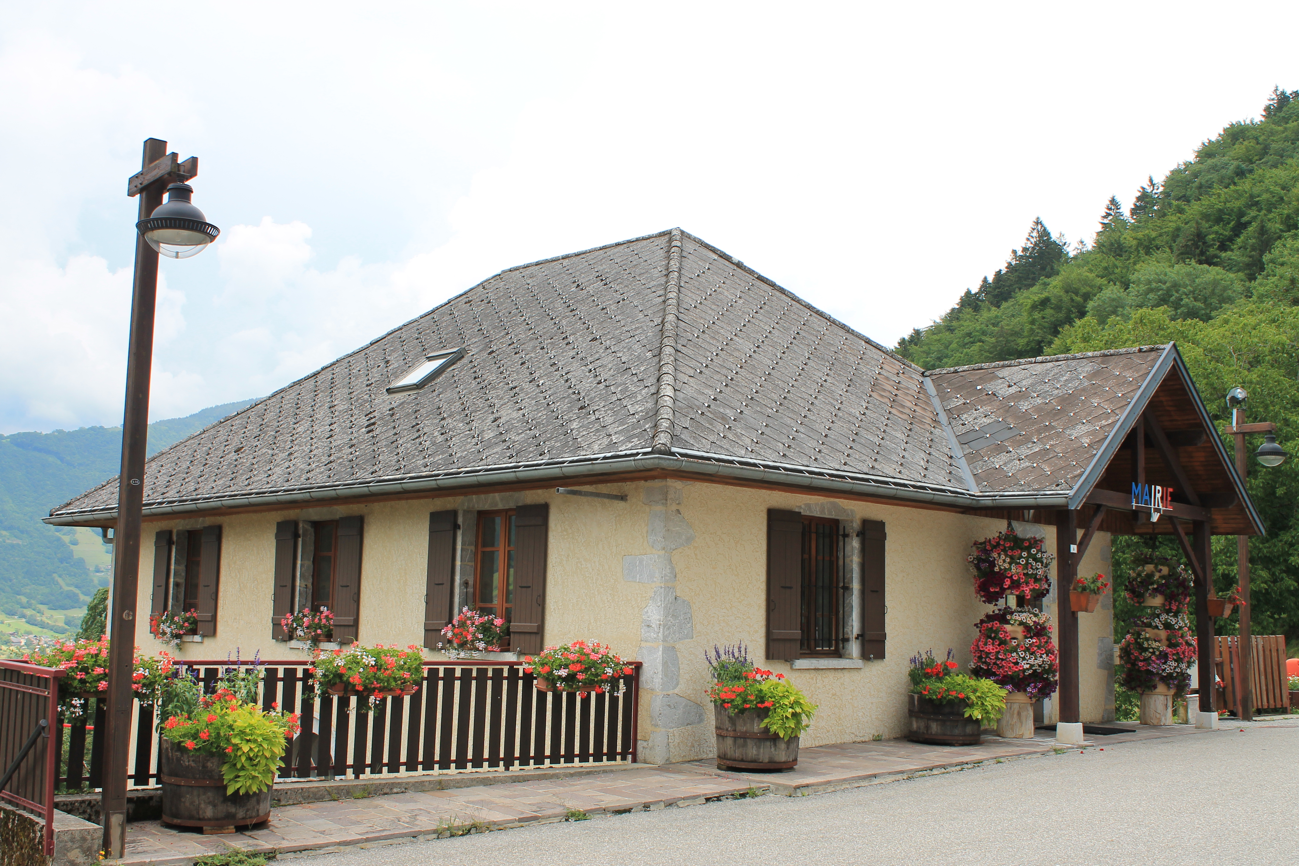 Maire de Cons-Sainte-Colombe